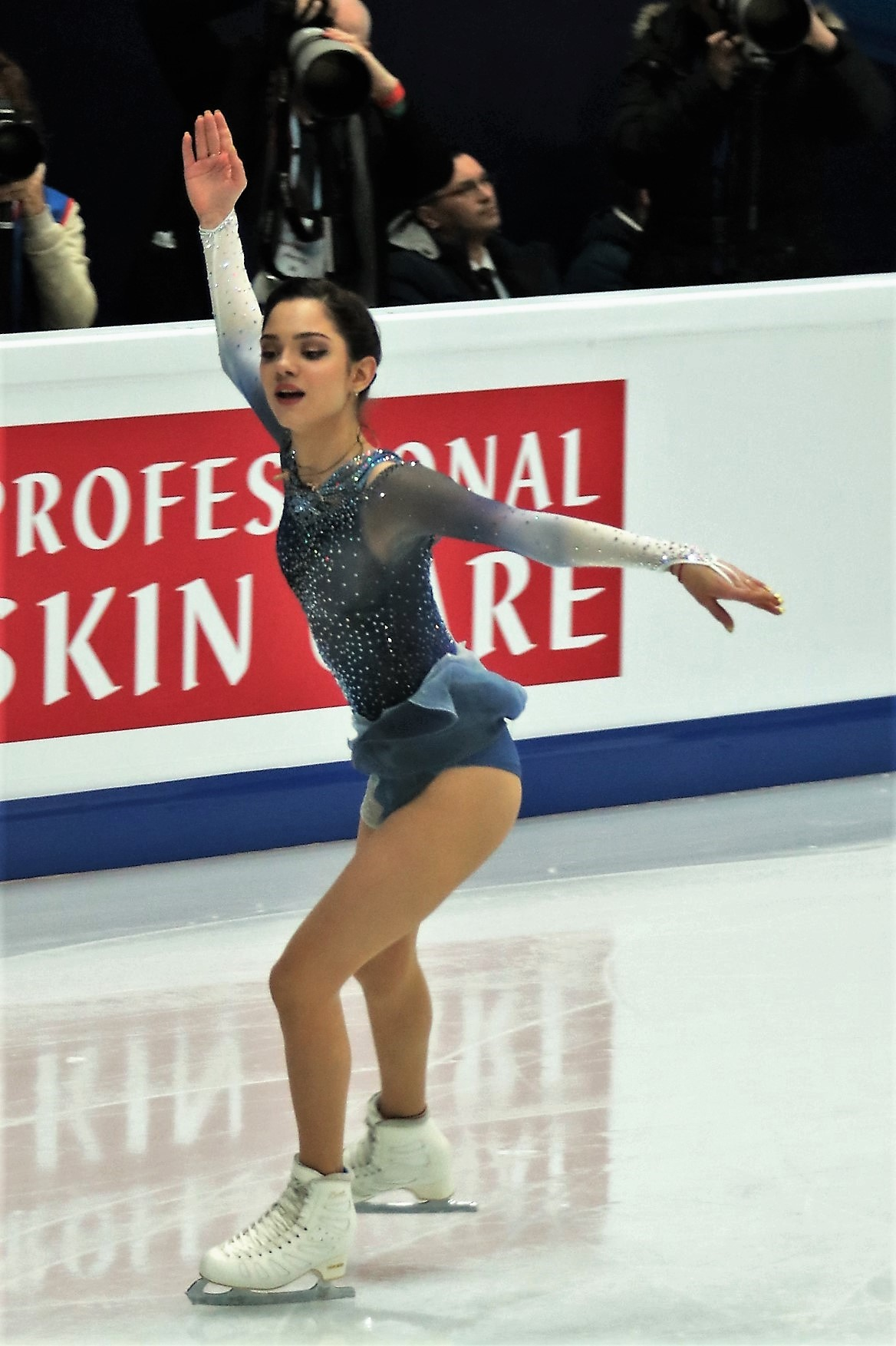 Евгения Медведева (Россия) на Чемпионате Европы по фигурному катанию 2018.